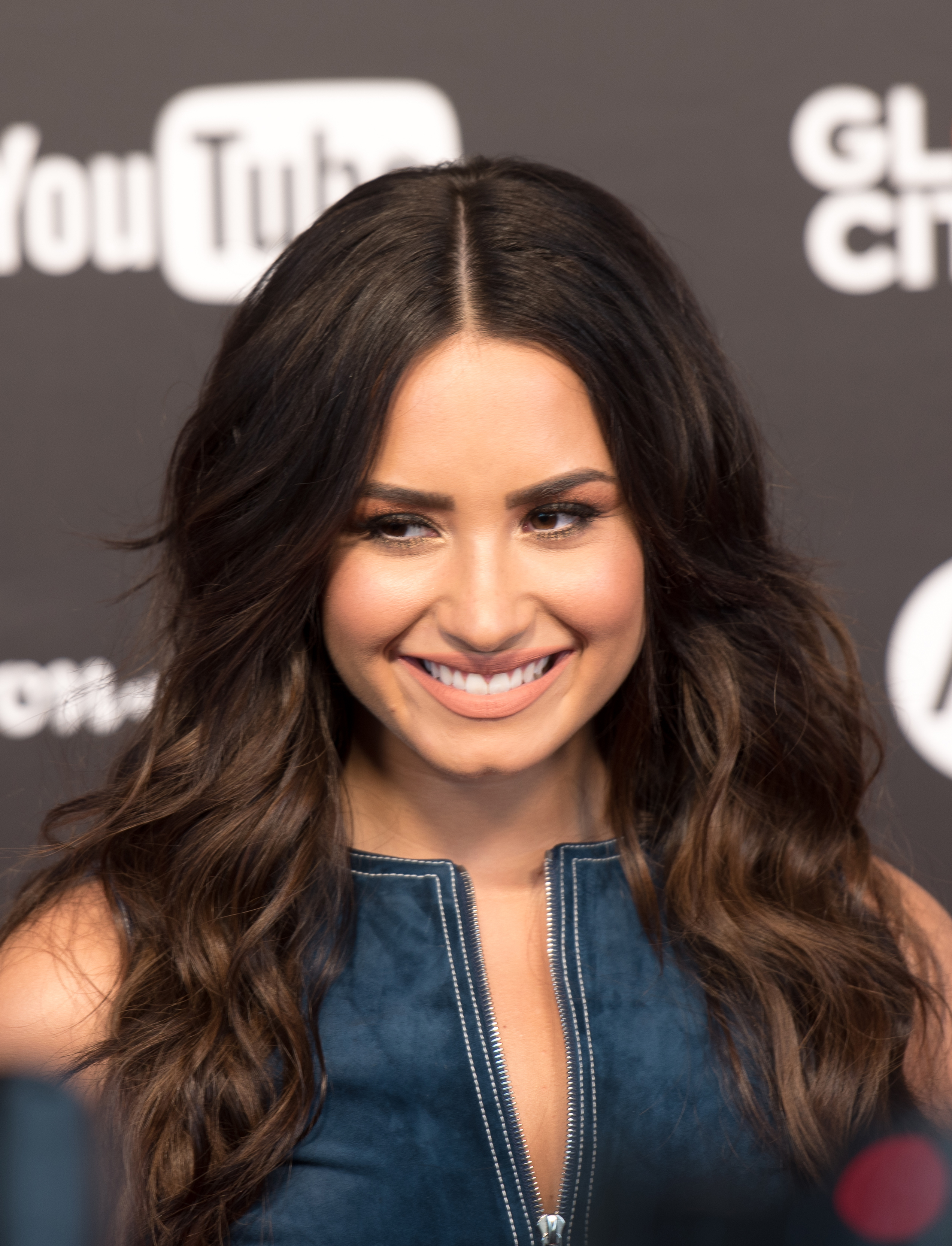 Demi Lovato beim Global Citizen Festival in Hamburg